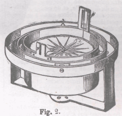 Description : type de boussole marine installée sur des cercles articulés